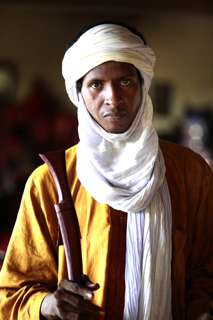 Ouagadougou